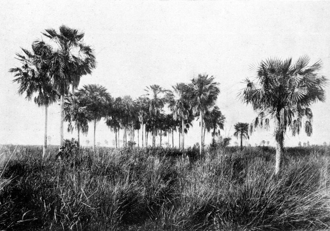 Caranday palms, Copernicia australis. Excursion Científica por los ríos Paraguay, Alto Paraná e Iguazú, en 1892